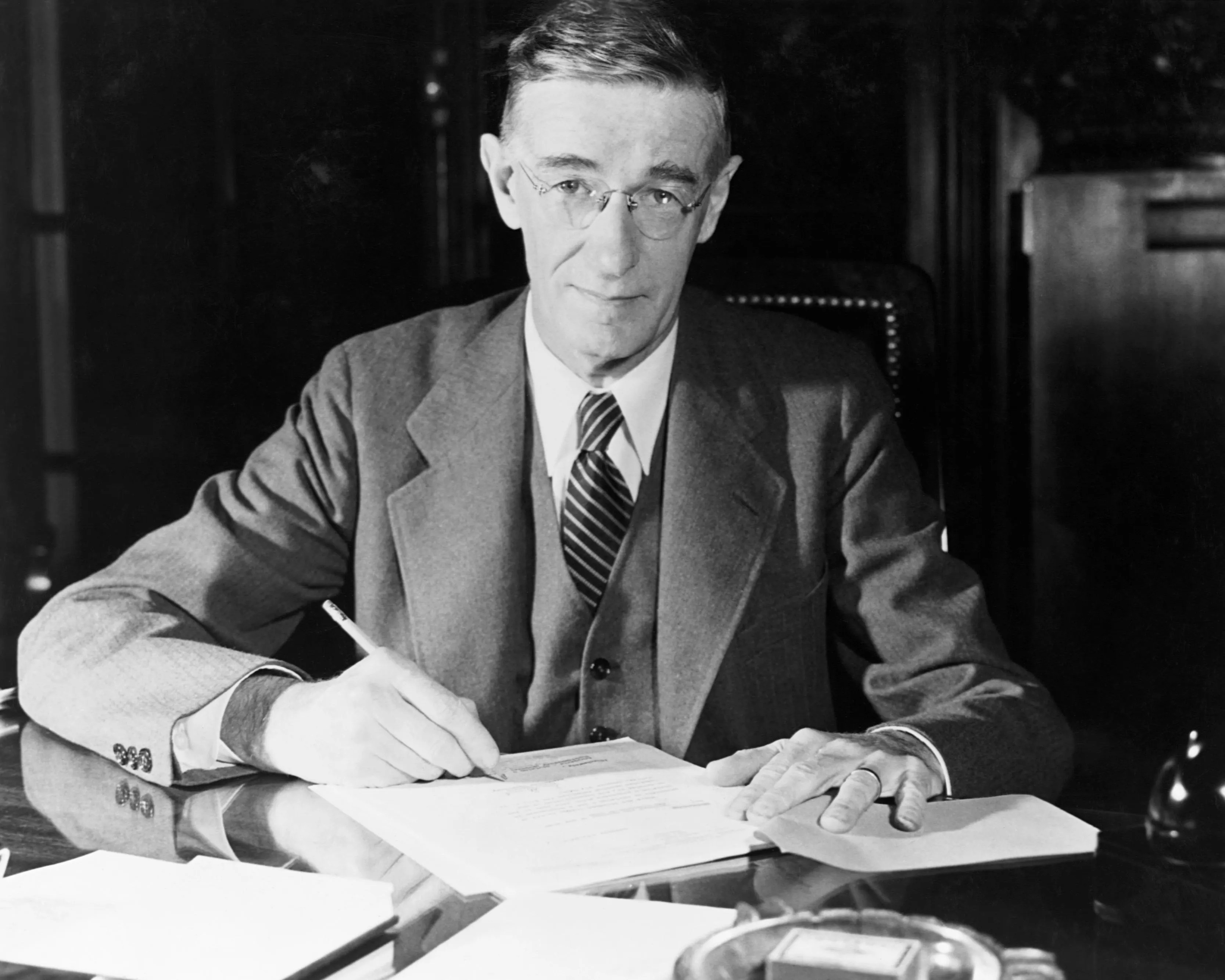 Vannevar Bush seated at a desk.